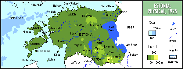 Estonia 1925, physical/Mapa fizyczna Estonii, 1925